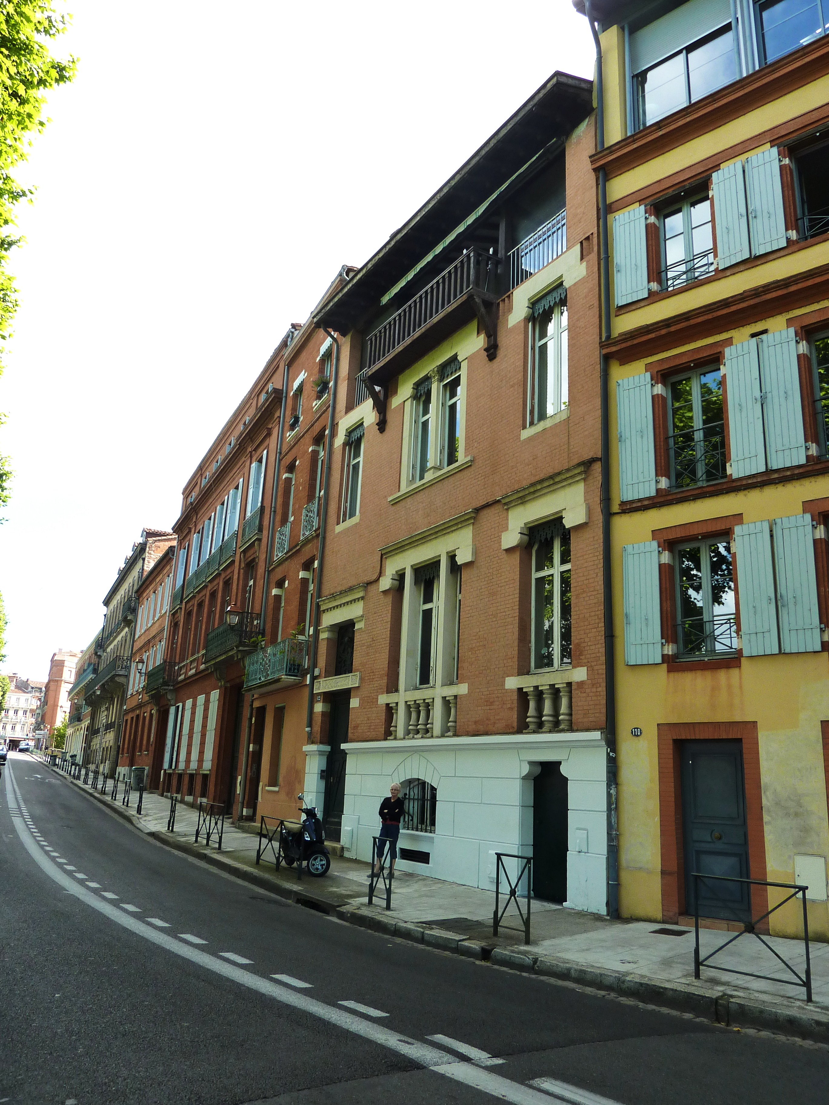 Toulouse (Haute-Garonne, France) : la maison de Claude Nougaro, quai de Tounis.